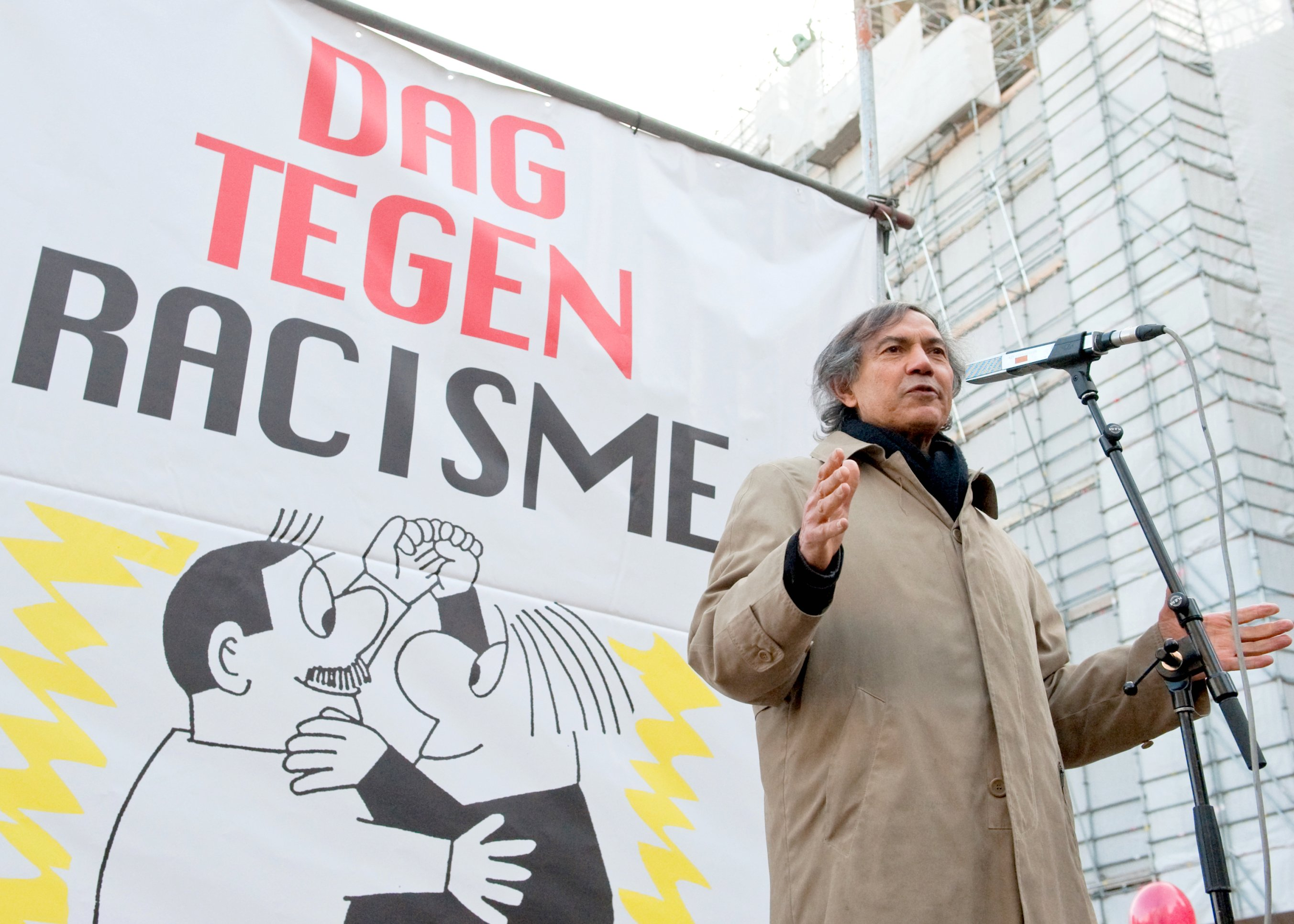 AMSTERDAM - Op zondagmiddag 21 maart was er een actie op de Dam in Amsterdam ter viering van de internationale dag tegen racisme van de Verenigde Naties. Daarvoor was er een bijeenkomst en debat in de Nieuwe Kerk. De sprekers waren o.a. Hedy D' Ancona, Mohammed Rabbae, René Danen en Volkskrant journalist Thomas von der Dunk. In heel Europa zijn rond 21 maart activiteiten in het kader van de International Day for the Elimination of All Forms of Racial Discrimination van de Verenigde Naties. De stichting Nederland Bekent Kleur organiseert sinds 1992 in ons land activiteiten rond de VN-dag.